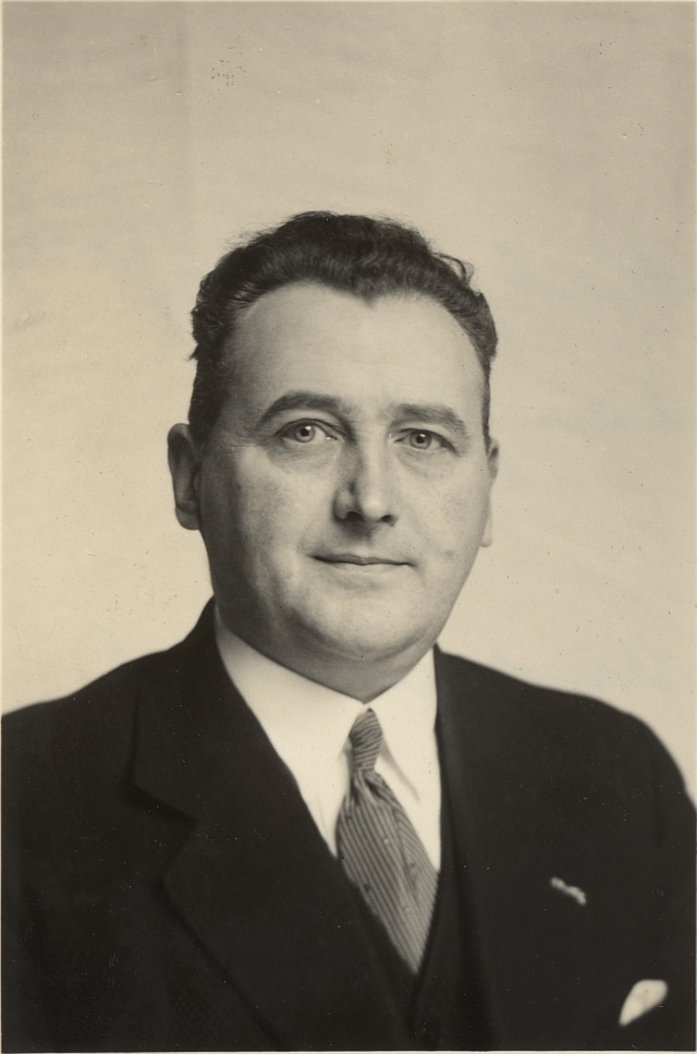 Portraitfoto van Leo Lens pseudoniem van Gerard van Oel